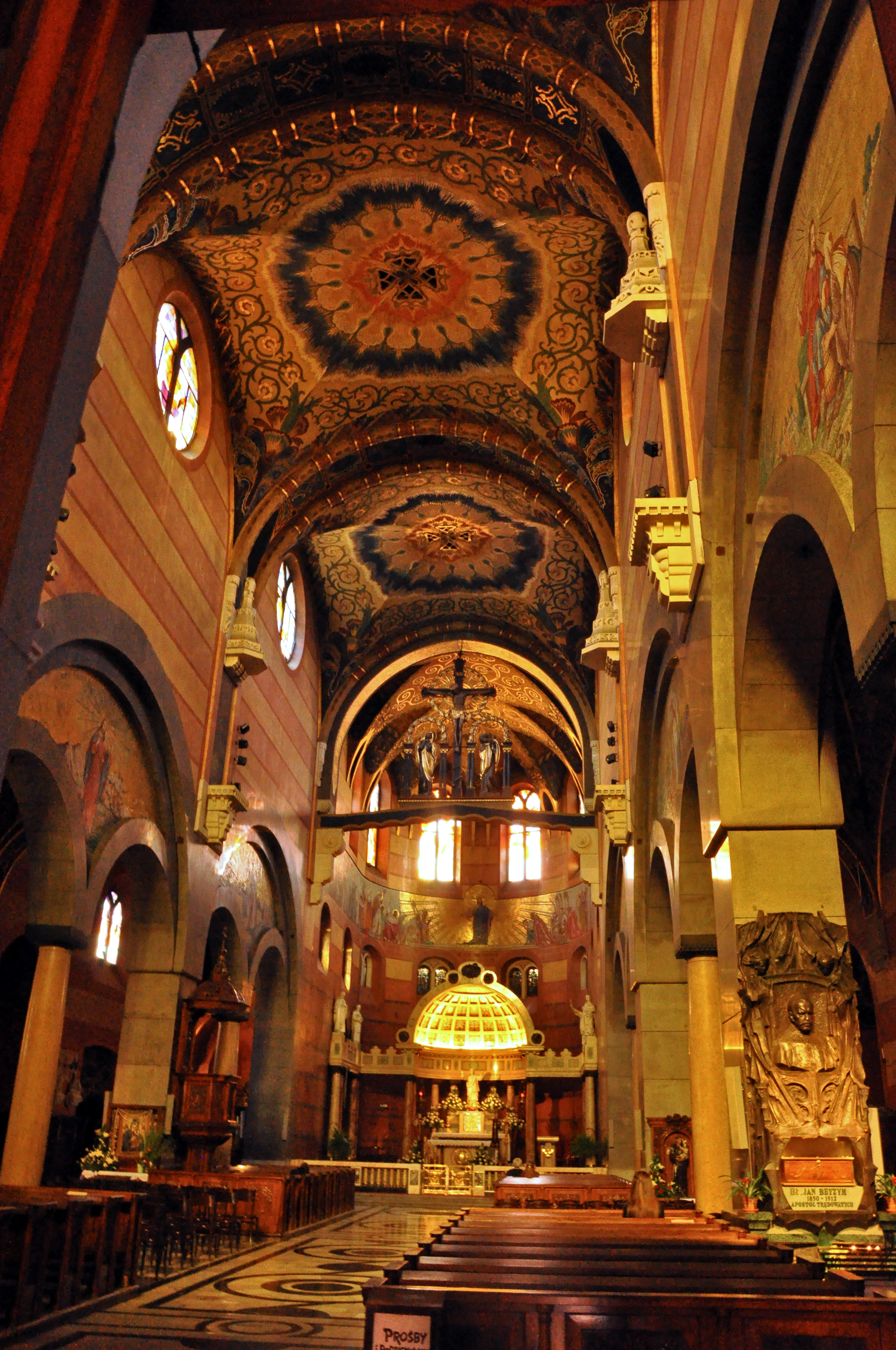 Kościół Najświętszego Serca Pana Jezusa w Krakowie